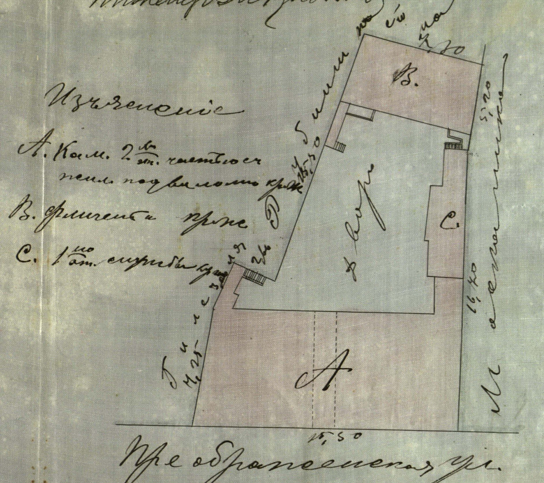 Беларуская (тарашкевіца): Менск (Miensk), вуліца Зборавая (vulica Zboravaja). Дом Грынгаўза (Grynhaŭz)